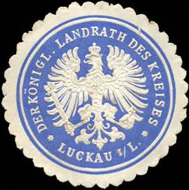 Sealing stamp Title: Der Königliche - Landrath des Kreises Luckau in der Lausitz Description: blau, weiß, geprägt Place: Luckau size: 4 cm